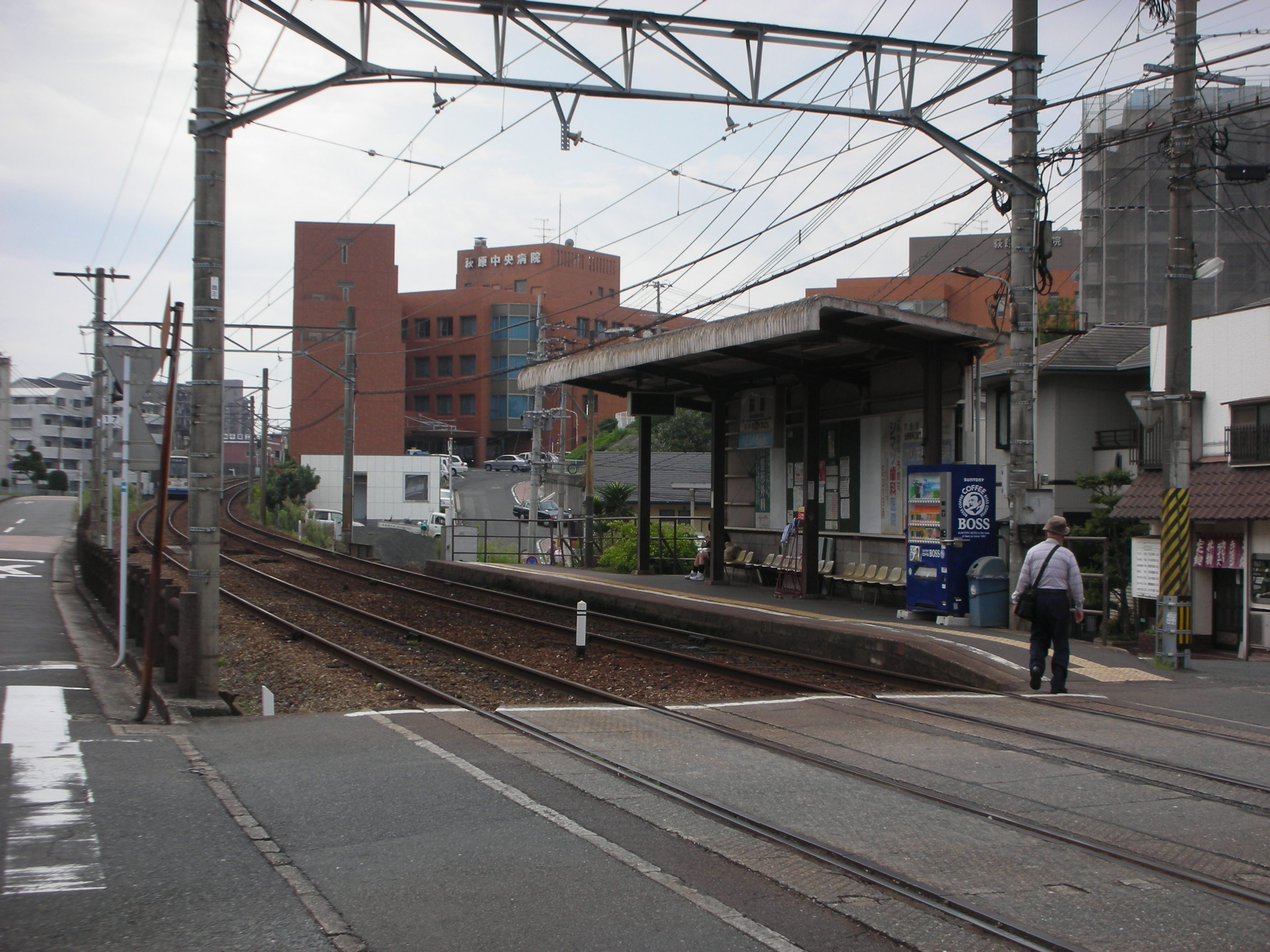 2008/10/10におんさき自身が撮影。北九州市萩原駅（黒崎方面のホーム）